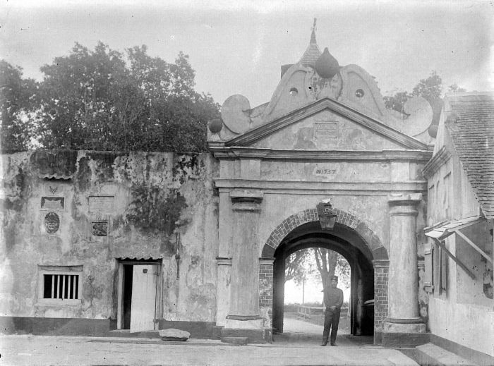 Negatief. Bij volkstellingen is vaak het criterium voor steden dat ze tenminste 20.000 inwoners tellen. Passen we dat toe op de Molukken in de koloniale periode, dan was er geen stad te vinden. De volkstelling van 1920 omzeilde het probleem door te spreken van 'kotta's' (kota was het Maleise woord voor stedelijke vestiging). Dat er in de Molukken geen steden van enige omvang waren in de laat-koloniale periode is niet vreemd: de eilanden hadden niet veel inwoners en er viel commercieel niet veel te beleven. Het stadje Ternate was de hoofdplaats van de Residentie Ternate en Onderhorigheden en telde ruim 6.500 inwoners in 1920. De aanwezigheid van een fort deed de plaats er ook als een stadje uitzien. (P. Boomgaard, 2001). Binnenzijde van fort Oranje te Ternate